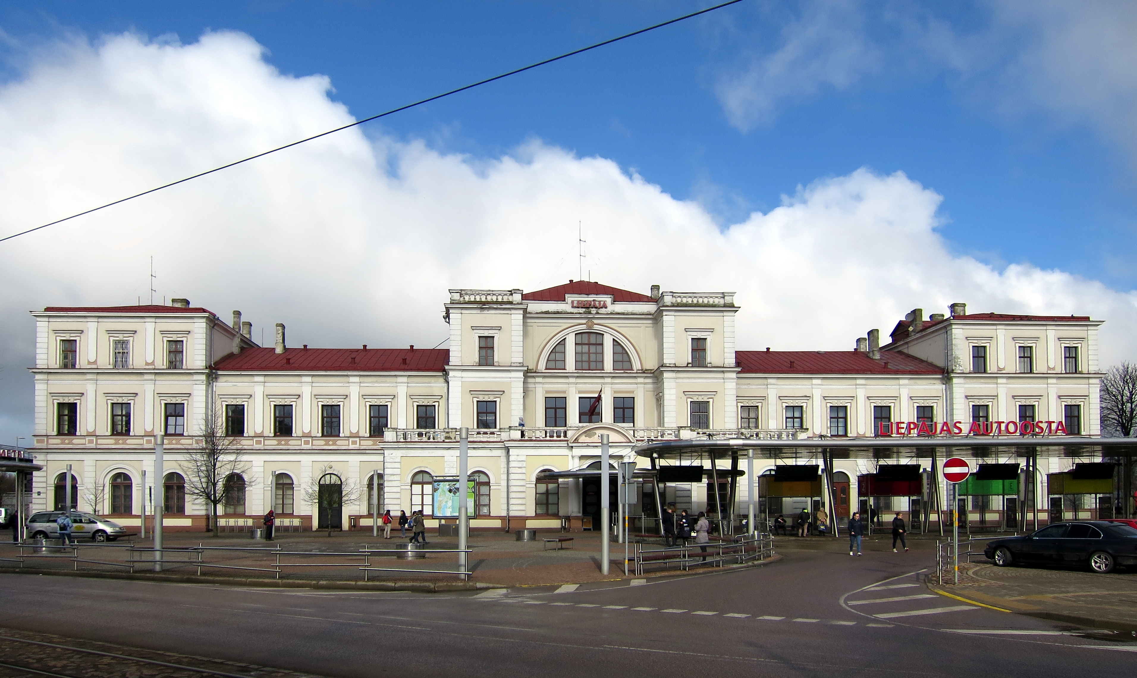 Liepājas stacija no autoostas puses